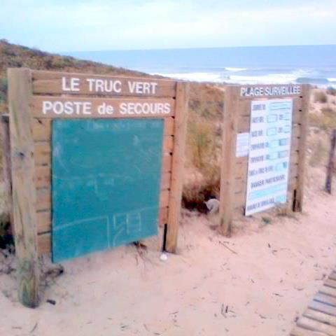 La fameuse plage du Truc Vert au Cap Ferret sur la presqu'île de Lège-Cap-Ferret près du Bassin d'Arcachon en Gironde